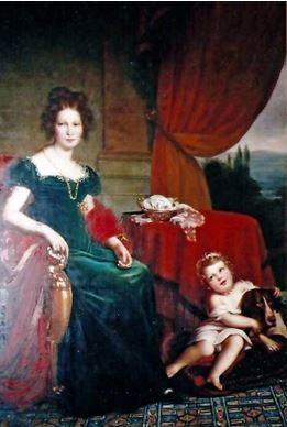 Portait de Gabrielle Le Blanc de Closmussey.